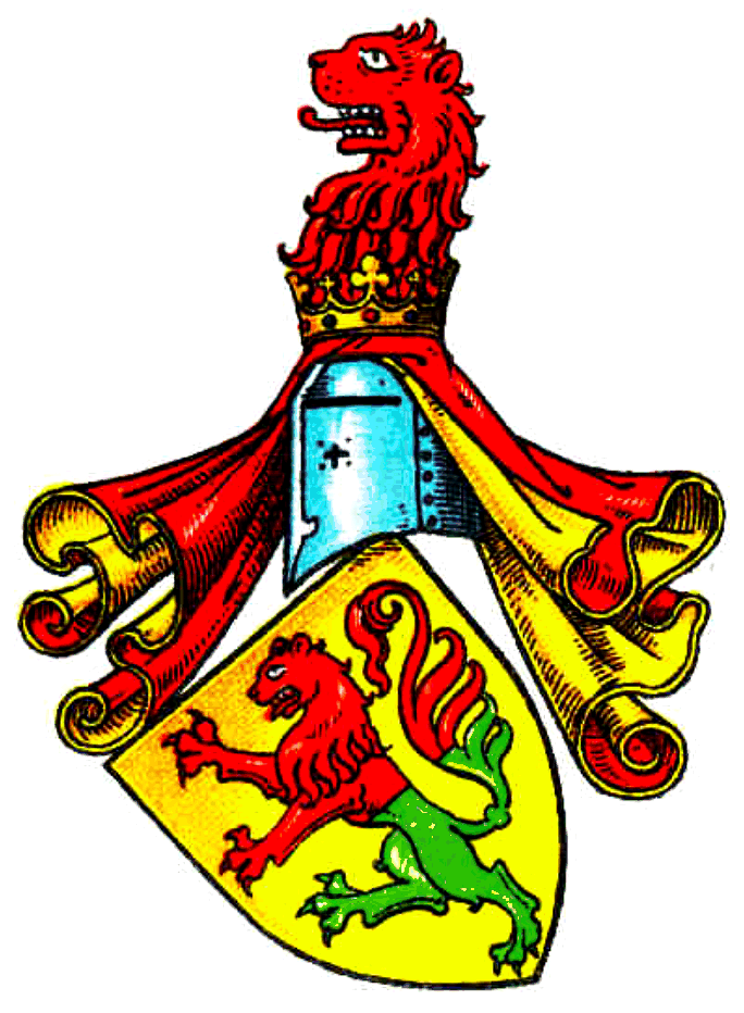 Stammwappen derer von Schönberg